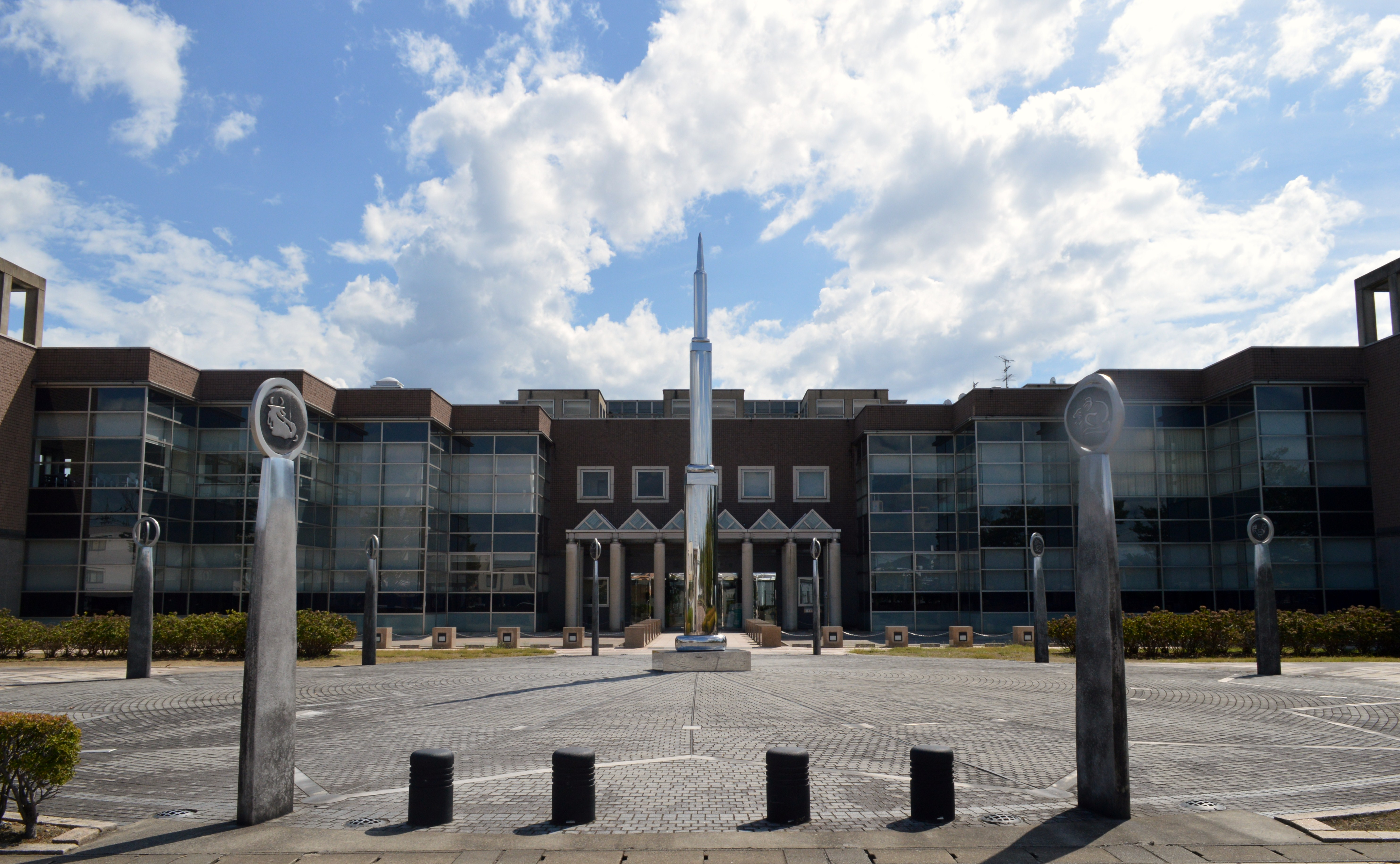 鯖江市文化の館。鯖江市図書館など。